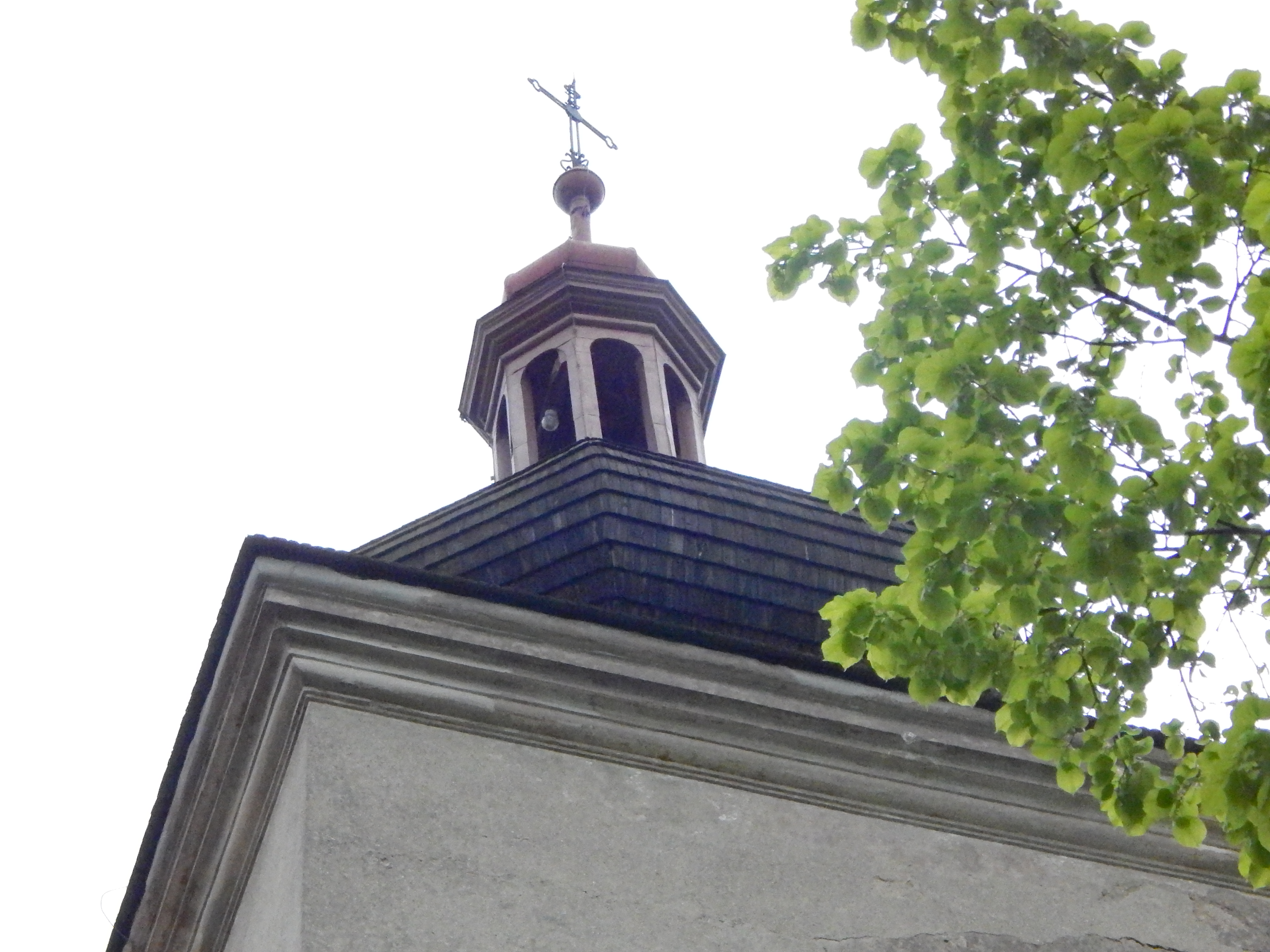 Milín-Slivice; kostel sv. Petra; Zakončení věže